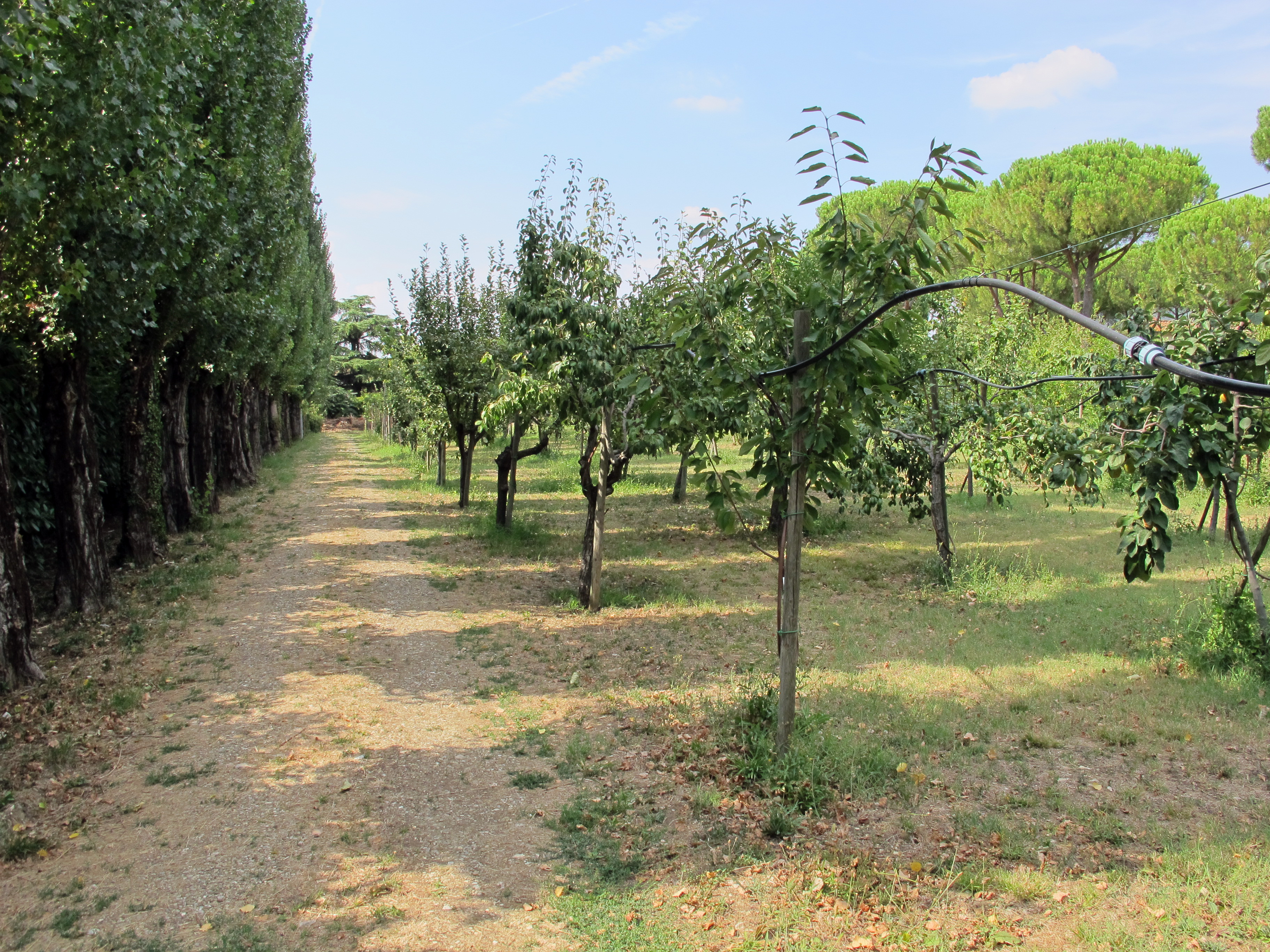 Villa Le Brache, Firenze (sede della Soka Gakkai)